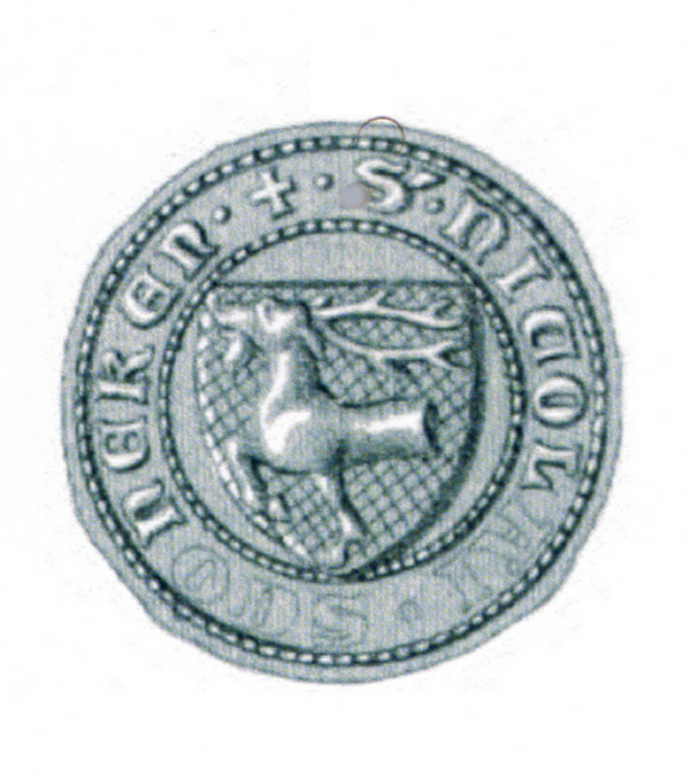 Siegel des Ratmannes Nicolaus Sconeke. Das Siegel stammt aus der Zeit um 1341. Siehe Emil Ferdinand Fehling: Lübeckische Ratslinie, Nr. 339 (Nikolaus Schoneke, BM 1347).